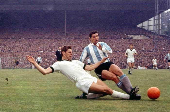 Argentina x Germania Federal en Inglaterra 1966. Weber x Artime.